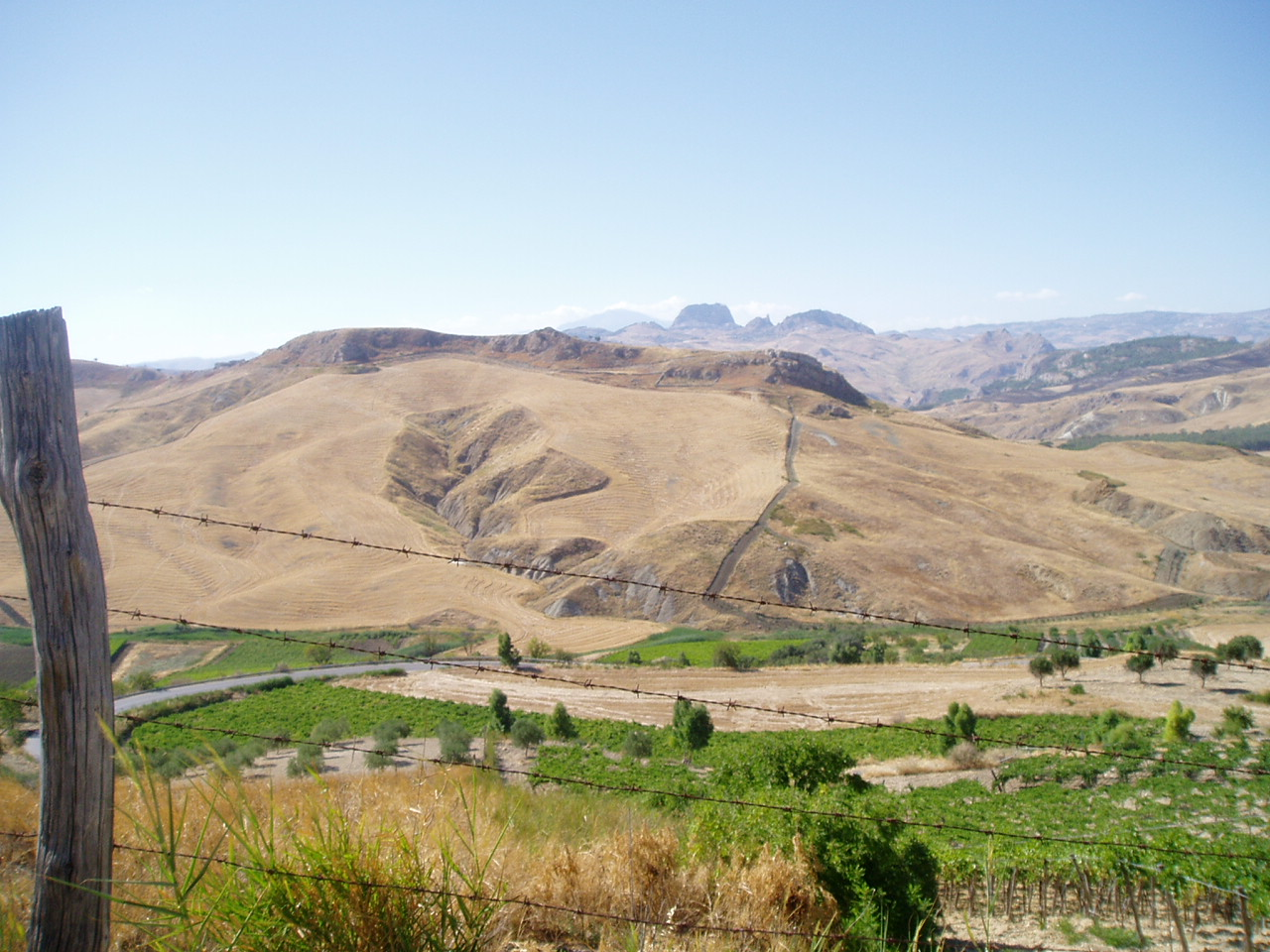 Landschap Sicilië